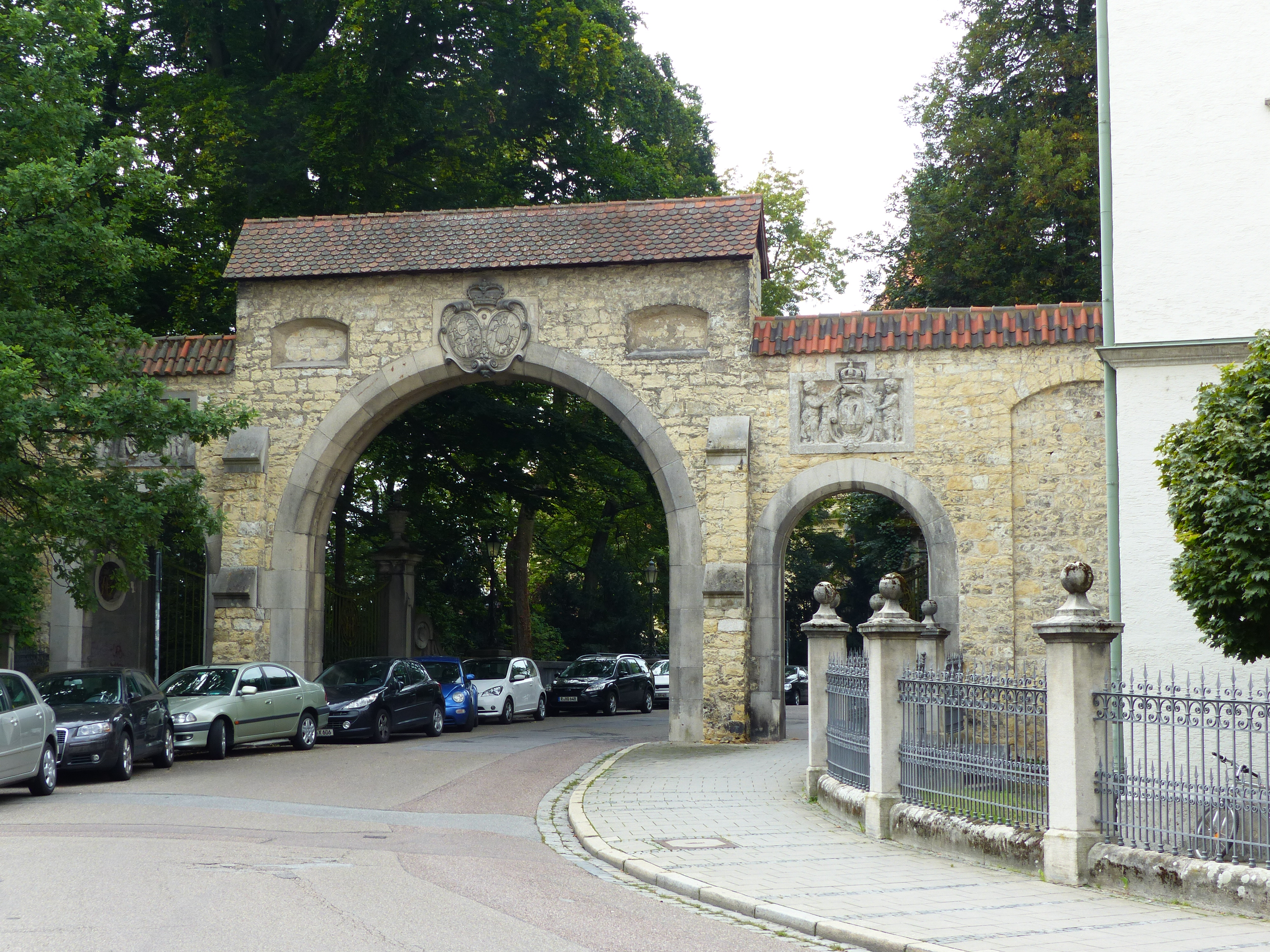 Schloss St. Emmeram von Thurn und Taxis in Regensburg. Schloss nicht zu sehen, sondern das nahe westlich benachbarte Helenentor, das 1908 als neuer Stadtausgang gebaut wurde von Max SchultzeThis is a photograph of an architectural monument.